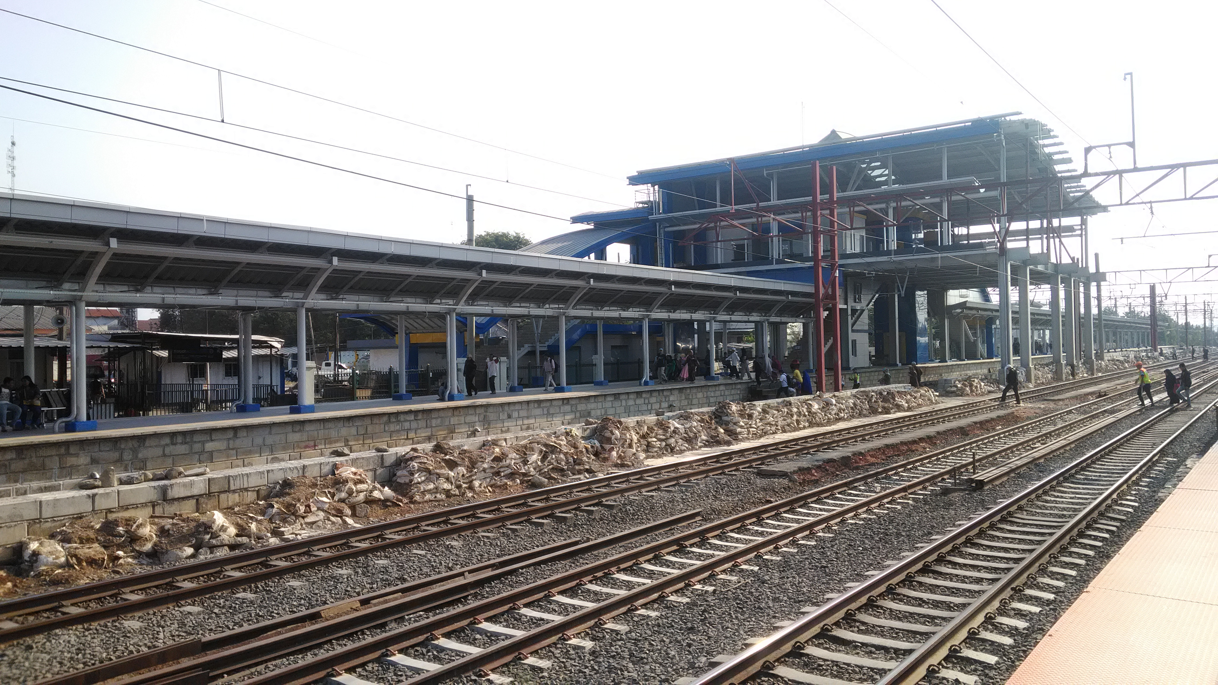 Stasiun Tambun Sunda: Stasion Tambun